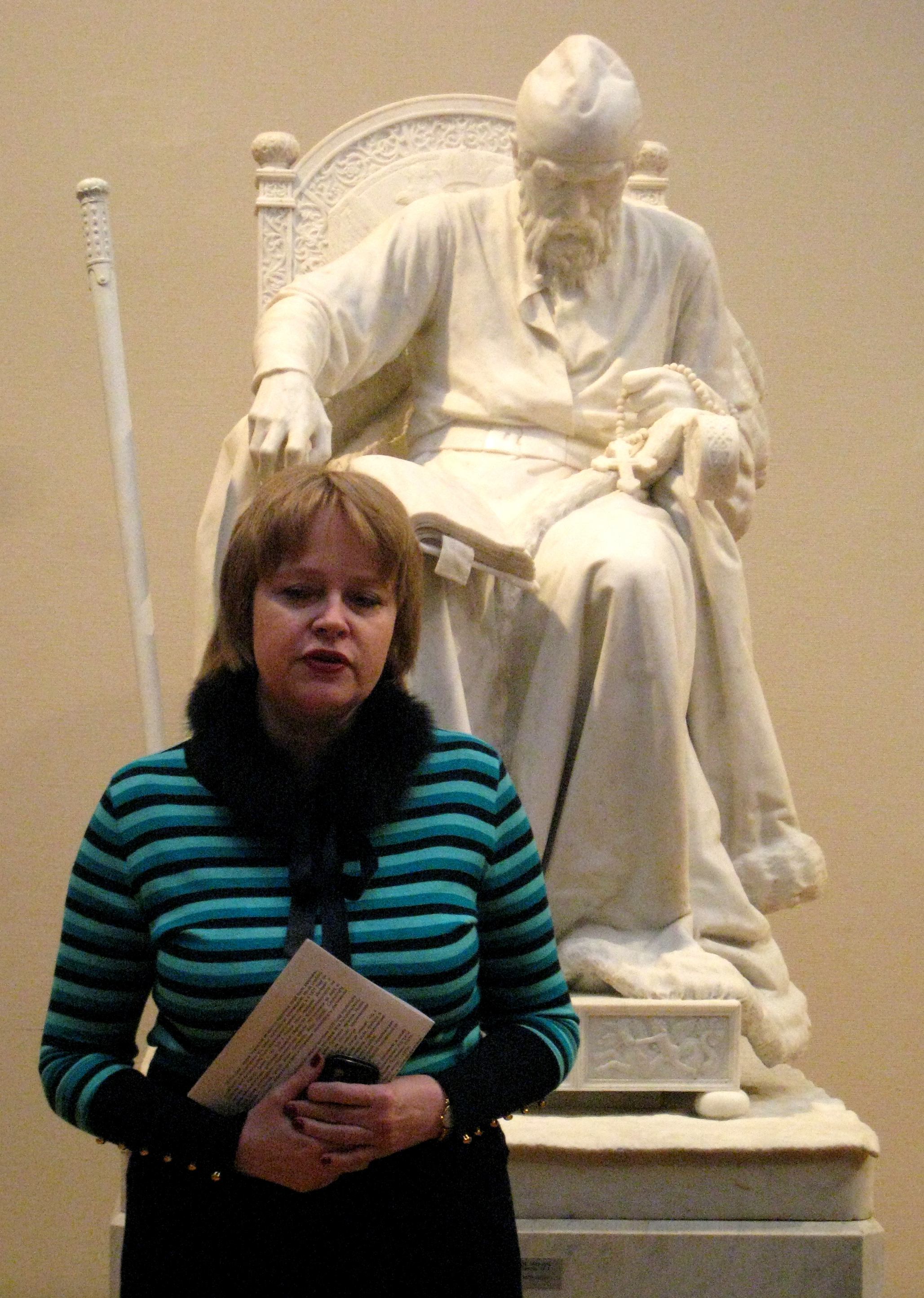 Директор Третьяковской галереи Ирина Лебедева на фоне скульптуры "Иван Грозный" работы Марка Антокольского